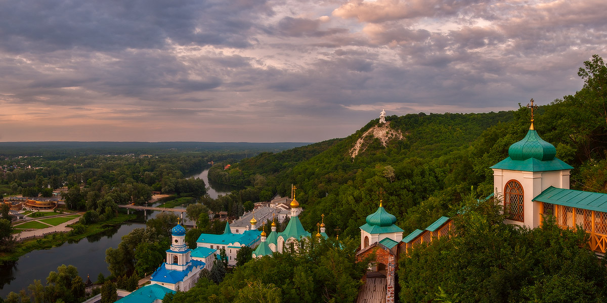 Святогірський Успенський монастир